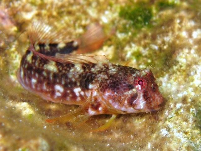 Parablennius zvonimiri photographed in Karpathos, Greece.